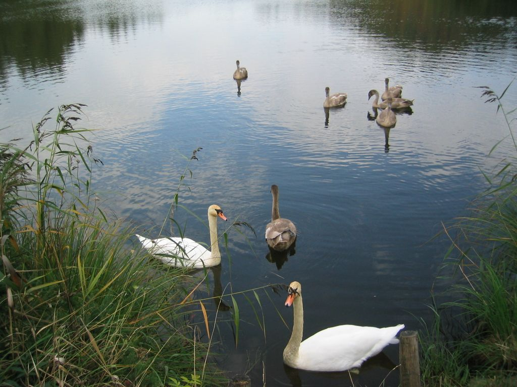 Wasservögel auf dem Schlossweiher, Gemeinde Eisenberg (Ostallgäu)